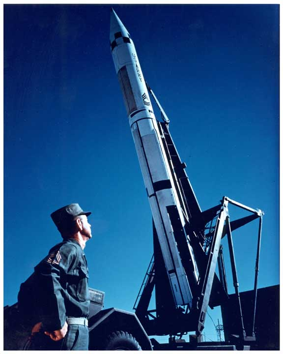 MGM-29 Sergeant